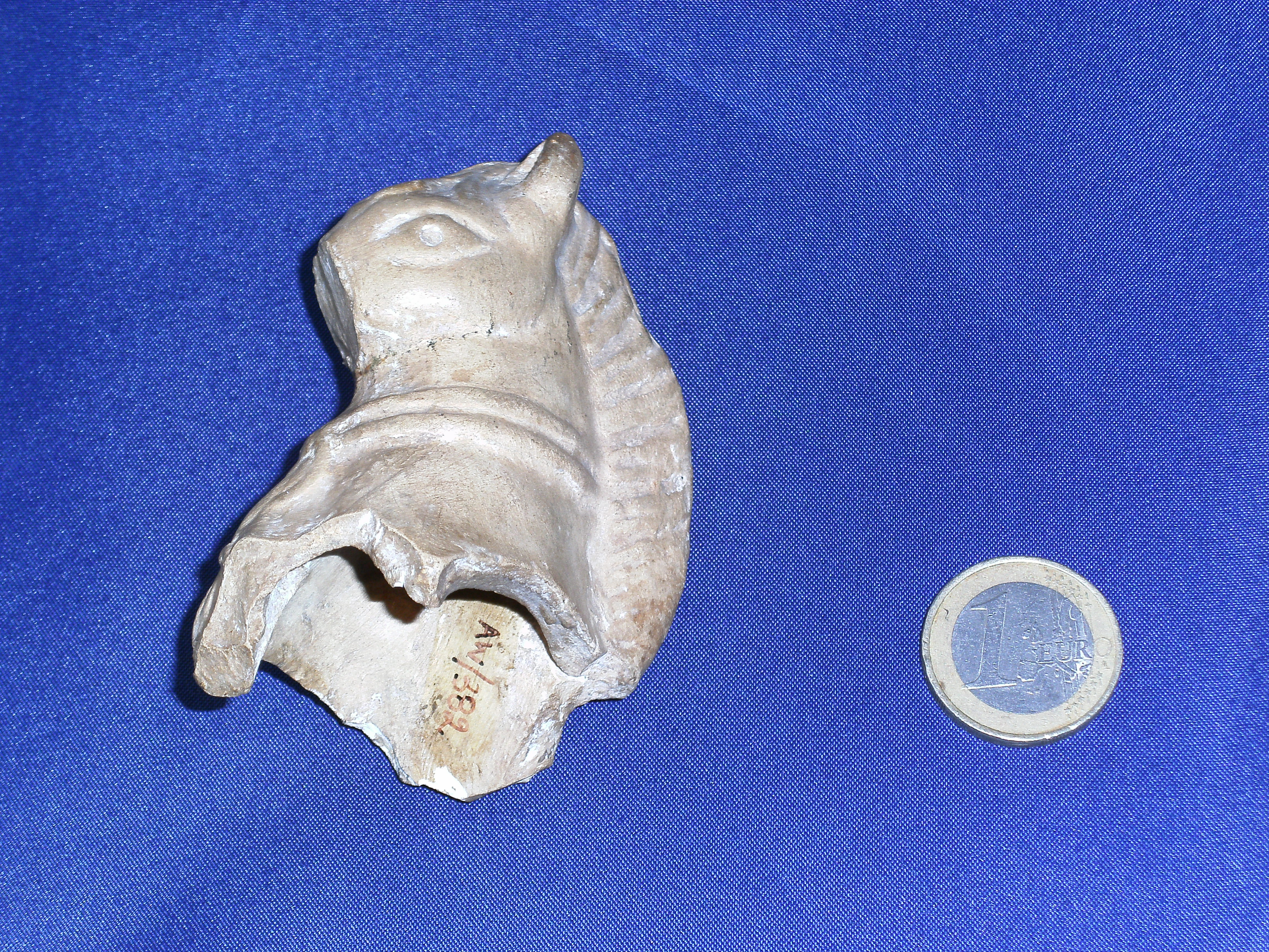 Romeins paardenbeeldje, in verband met de cultus van Epona, gevonden te Elewijt